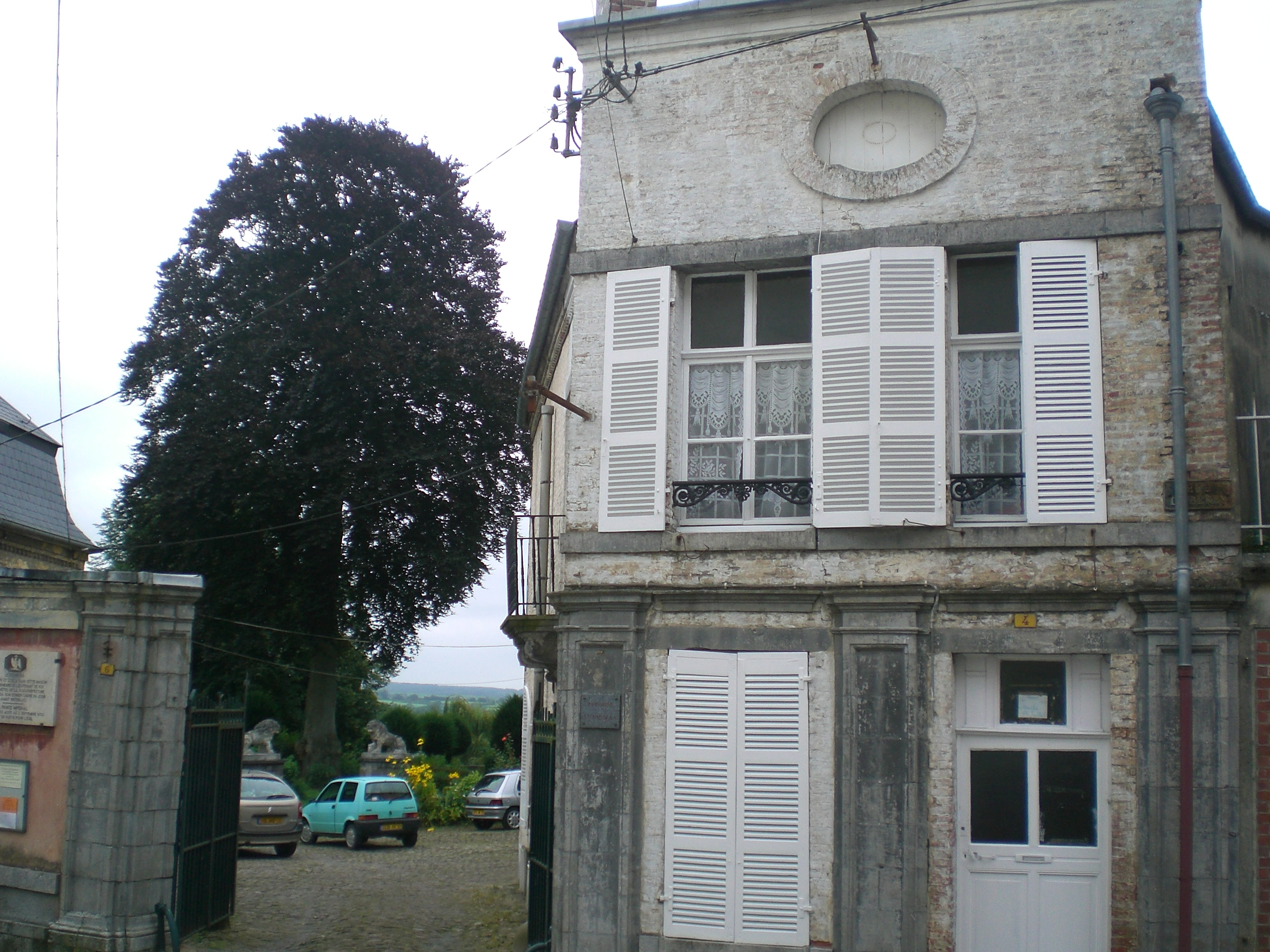 presbytere d'avesnes sur helpe